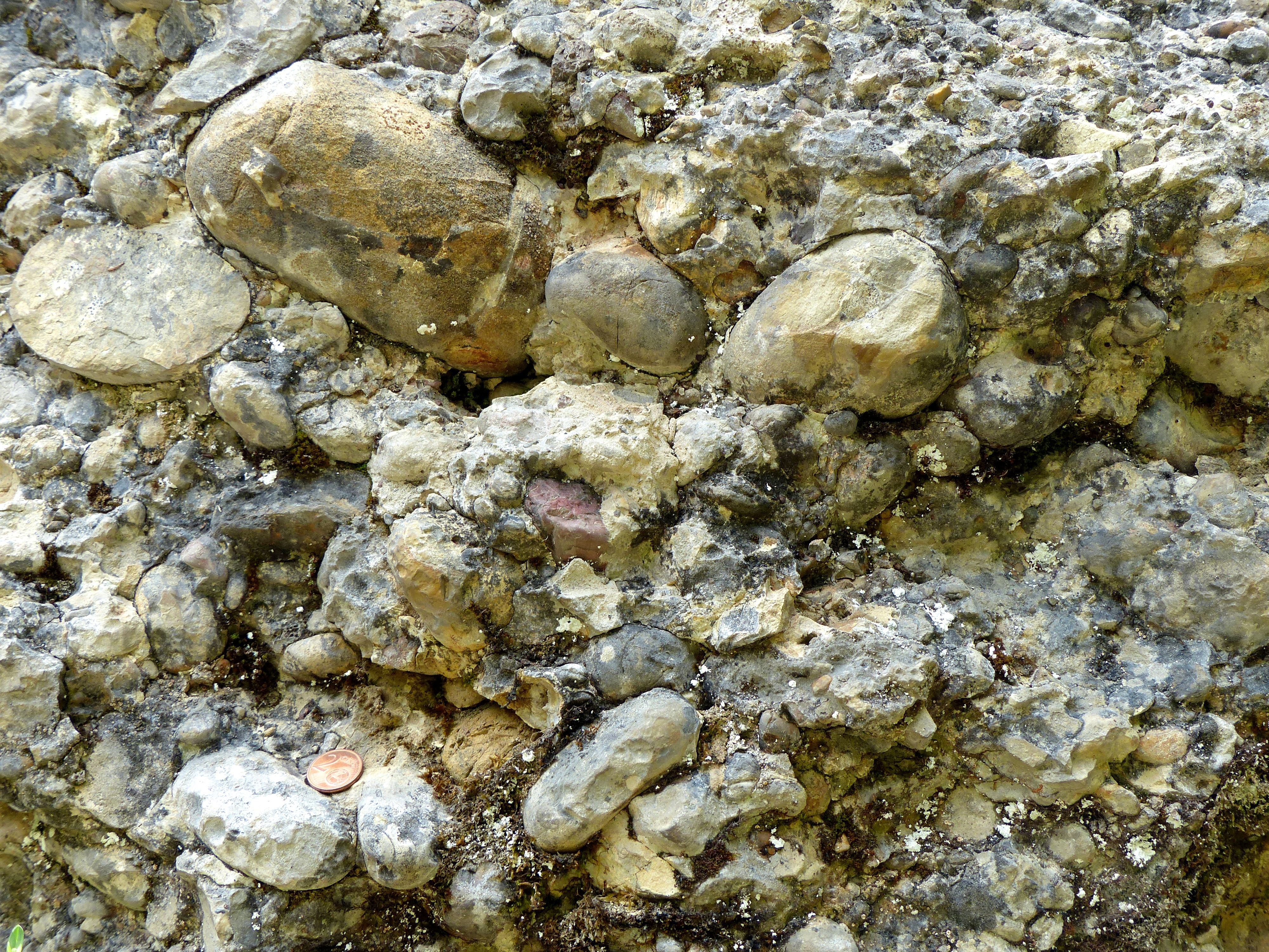 Geotop Dengelstein: Findling im Kemptener Wald (Konglomerat / Untere Kojenschichten (untere Süßwassermolasse))